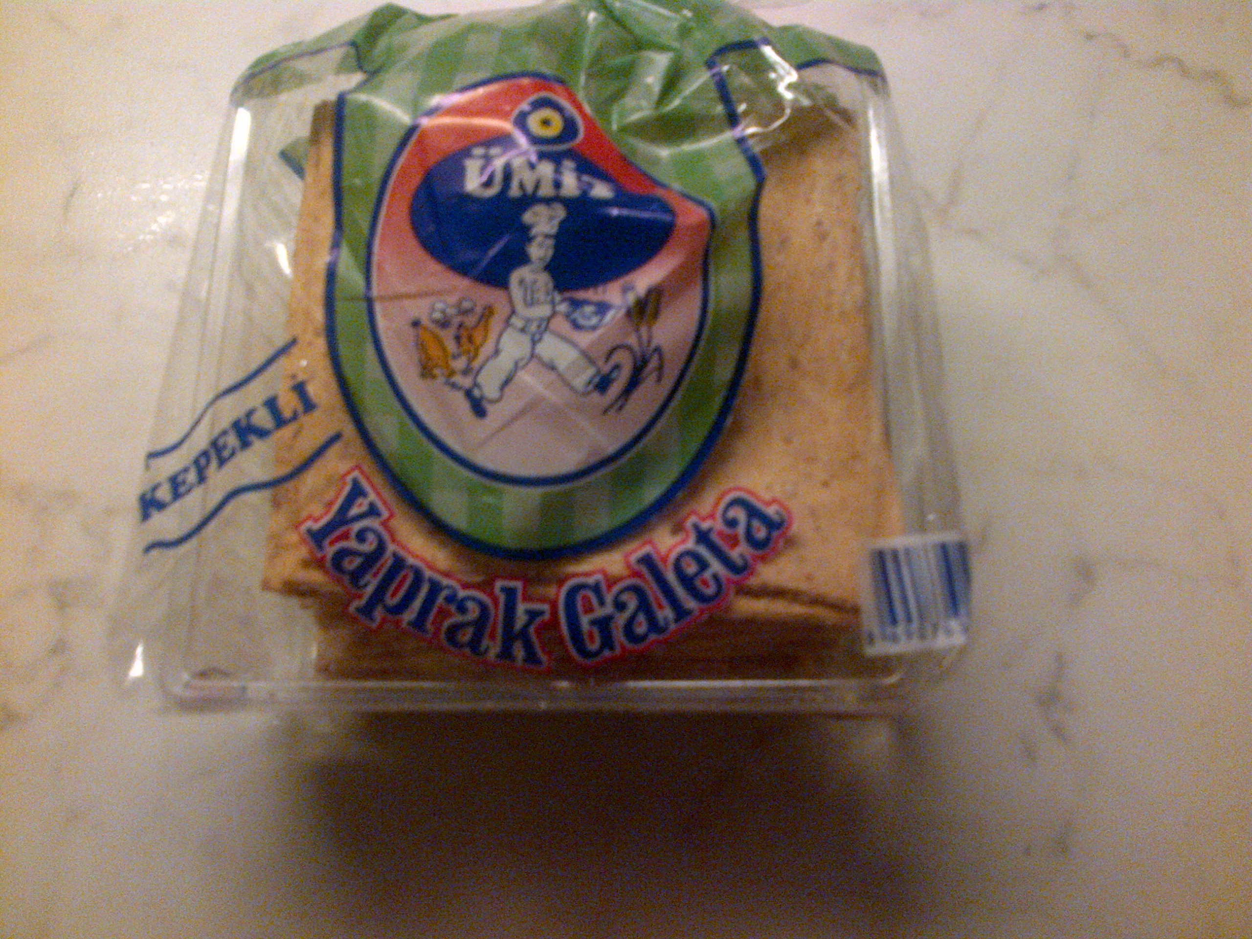 Galetas tipo "hoja" turcas.